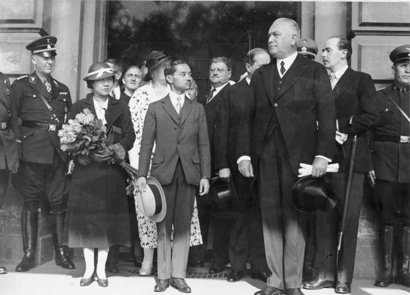 Scherl Bilderdienst: Ankunft des siamesischen Königspaares auf dem Lehrter Bahnhof. Heute nachmittag um 4.11 Uhr traf auf dem Lehrter Bahnhof mit dem fahrplanmässigen D-Zug aus Hamburg kommend das siamesische Königspaar ein. UBz: das siamesische Königspaar mit Freiherr von Neurath vor dem Lehrter Bhf. 25229-34